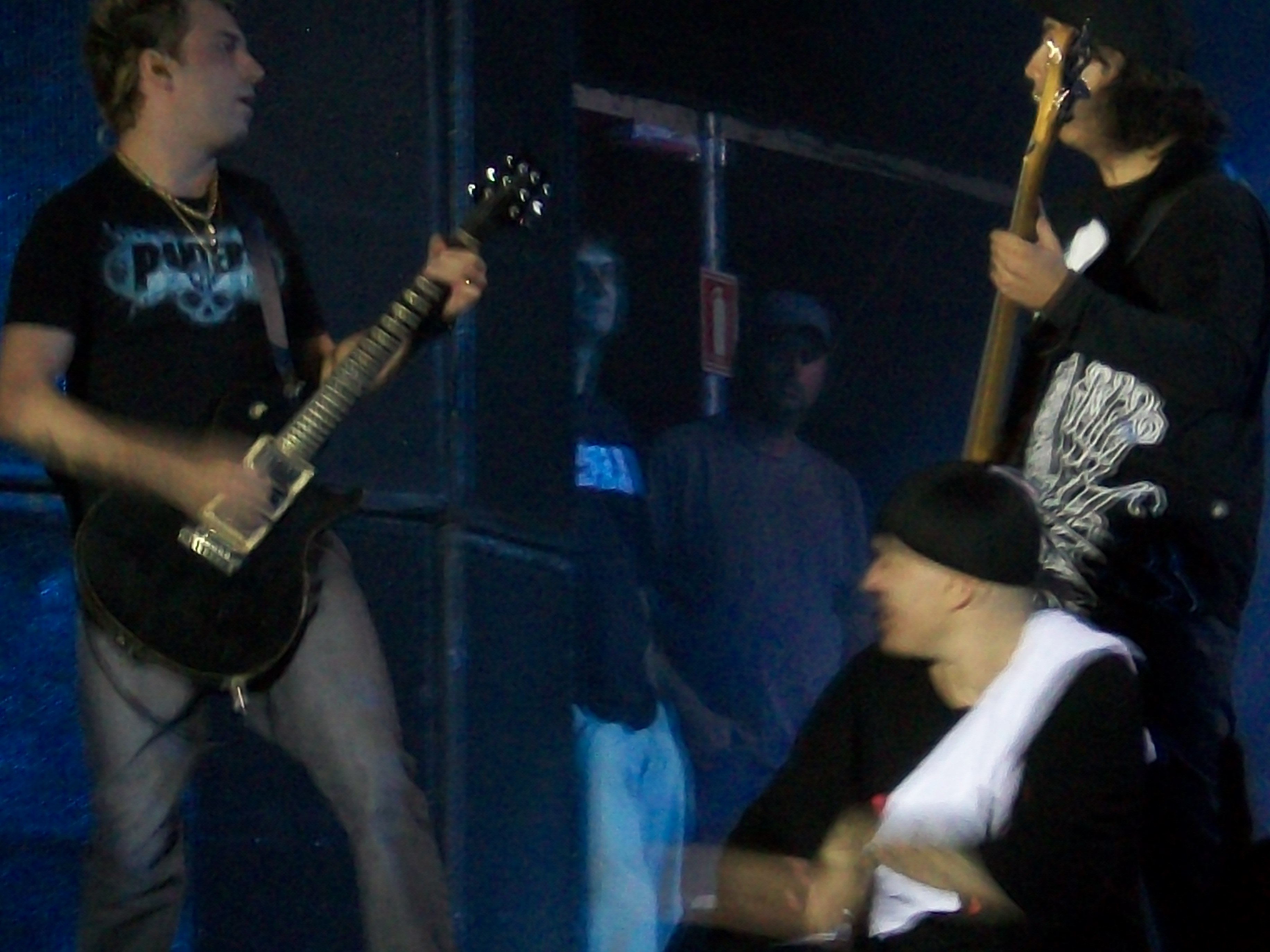 Banda brasileira Charlie Brown Jr. no Megamotofest em Araçaruba.